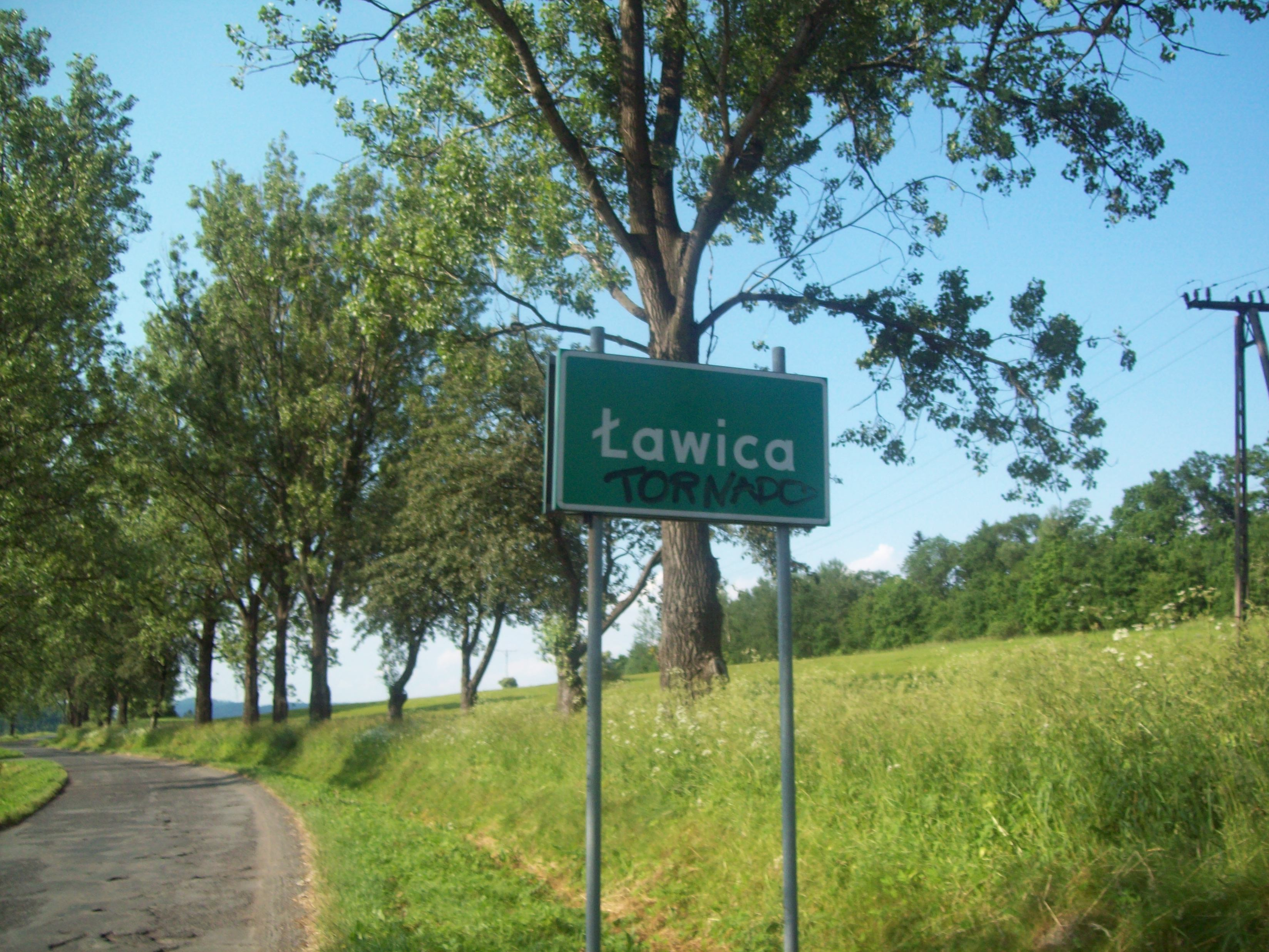 Tablica informacyjna w Ławicy